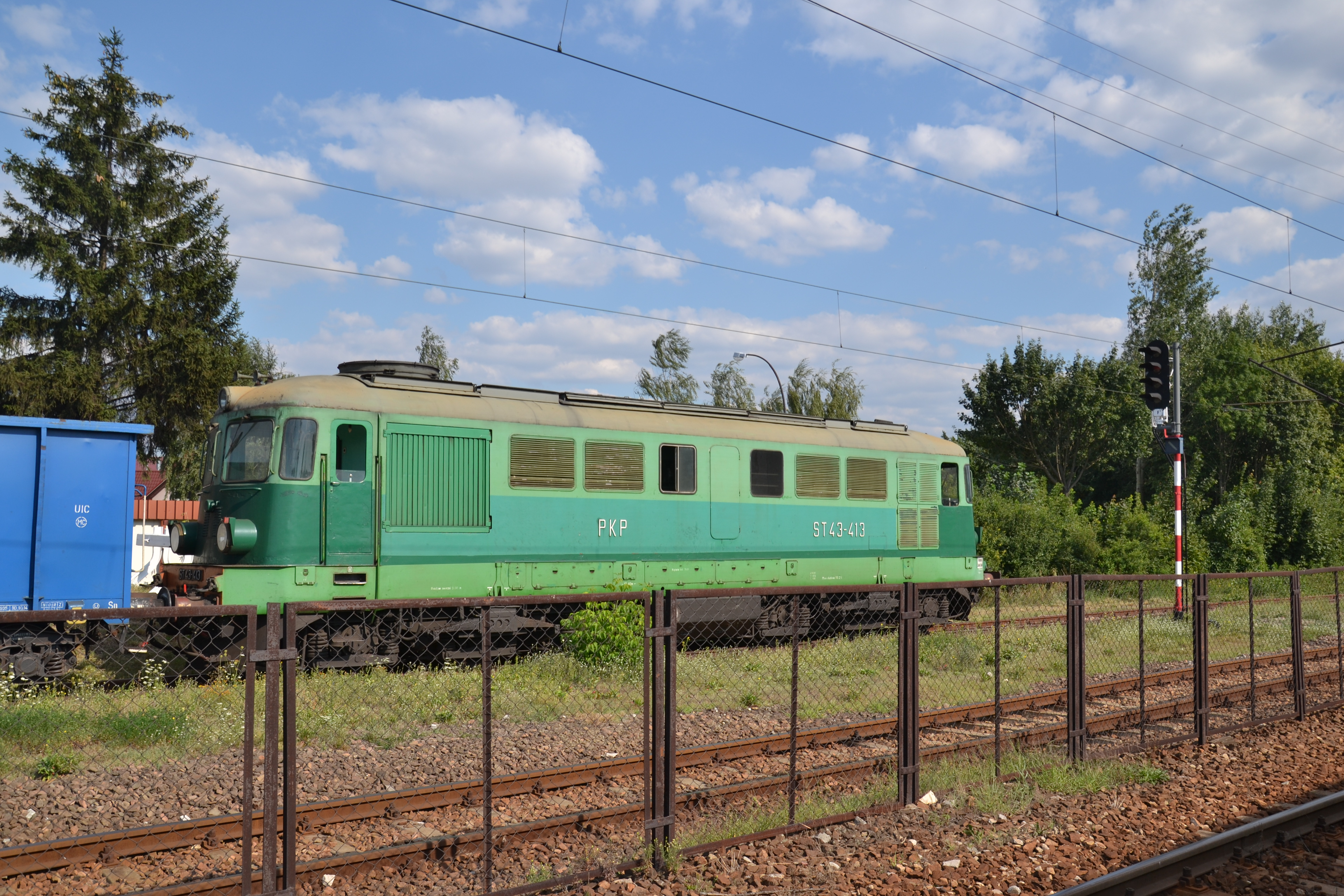 ST43-413 oczekuje odjazdu ze stacji Leżajsk This photo was taken during Railway Wikiexpedition 2015 set up by Wikimedia Polska Association in cooperation with Fundacja Grupy PKP. You can see all photographs in category Wikiekspedycja kolejowa 2015.